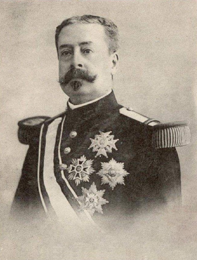 Foto personaje ilustre fallecido en 1914